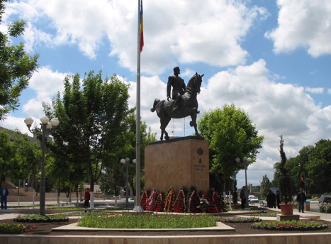 Statuie ecvestra a regelui Carol I, în Călăraşi, România